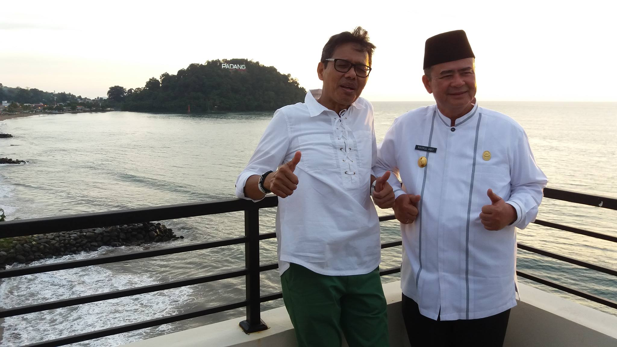 Irwan Prayitno Nasrul Abit Gunung Padang